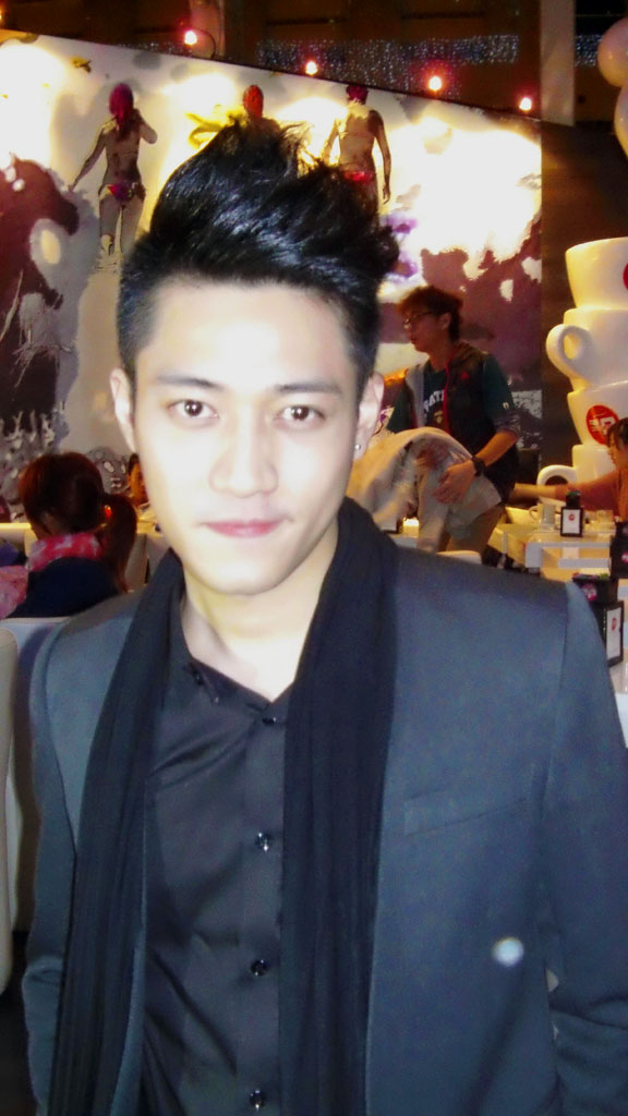 中文（香港）: 鄒文正的樣子